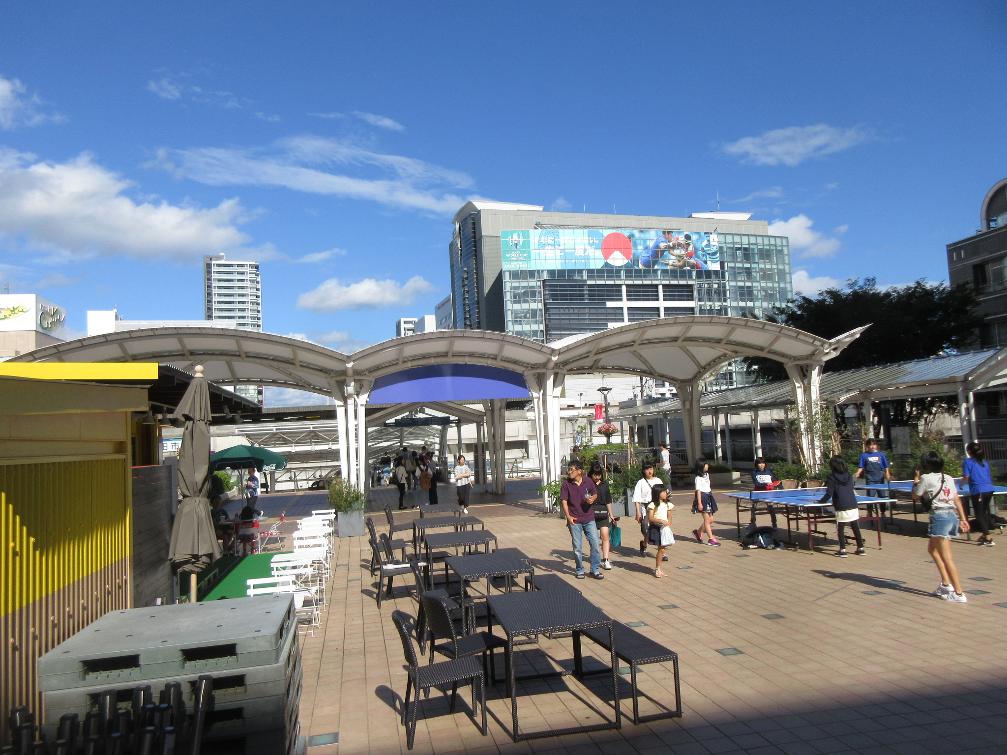 名鉄豊田市駅西口のペデストリアンデッキ、参合館